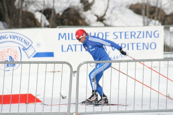 See Title